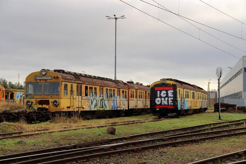 Elektryczne zespoły trakcyjne EW58-012 i EW58-005 odstawione na terenie lokomotywowni SKM Trójmiasto w Gdyni i oczekujące na złomowanie.